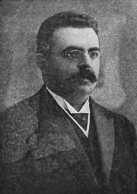 Józef Gold (-1907)